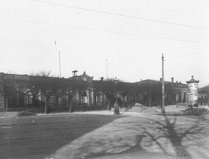 Abgangshalle des Schlesischen Bahnhofs in Dresden um 1897 von Süden gesehen